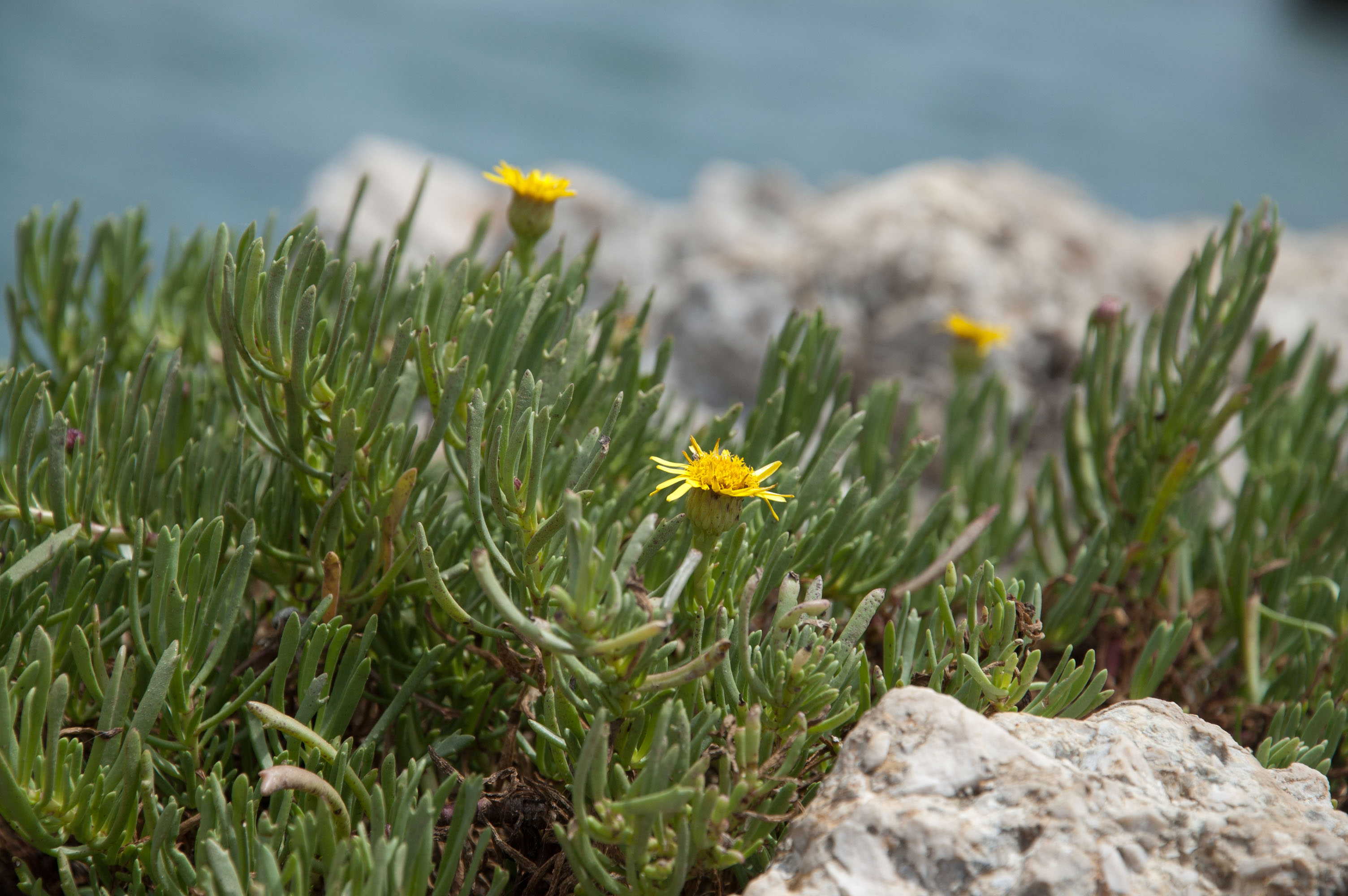 Limbarda crithmoides (L.) Dumort. Favignana, Sicily